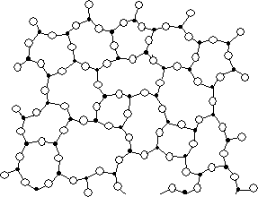 Représentation schématique bi-dimensionnelle de la silice vitreuse Schéma réalisé par utilisateur:Clem Cousi Utilisateur:Clem Cousi